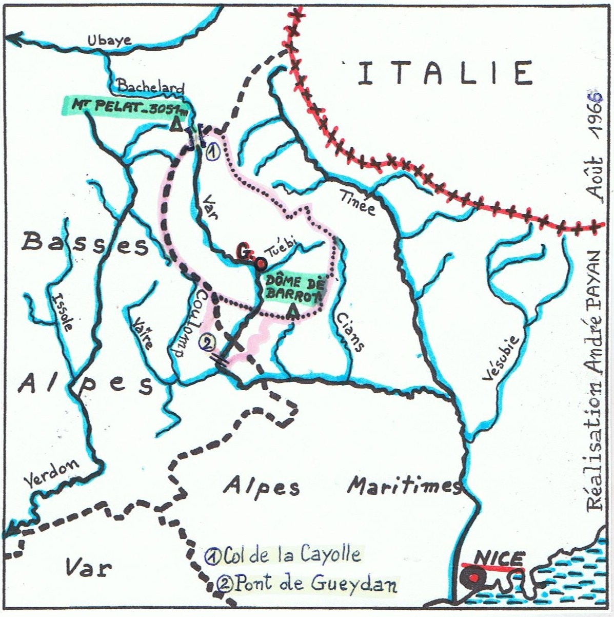 Le bassin hydrographique du Haut-Var (aux limites en rose) et ses deux sous-secteurs dont le plus important est limité en pointillés.